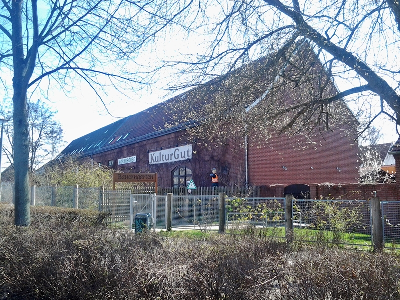 KulturGut (Berlin-Marzahn)